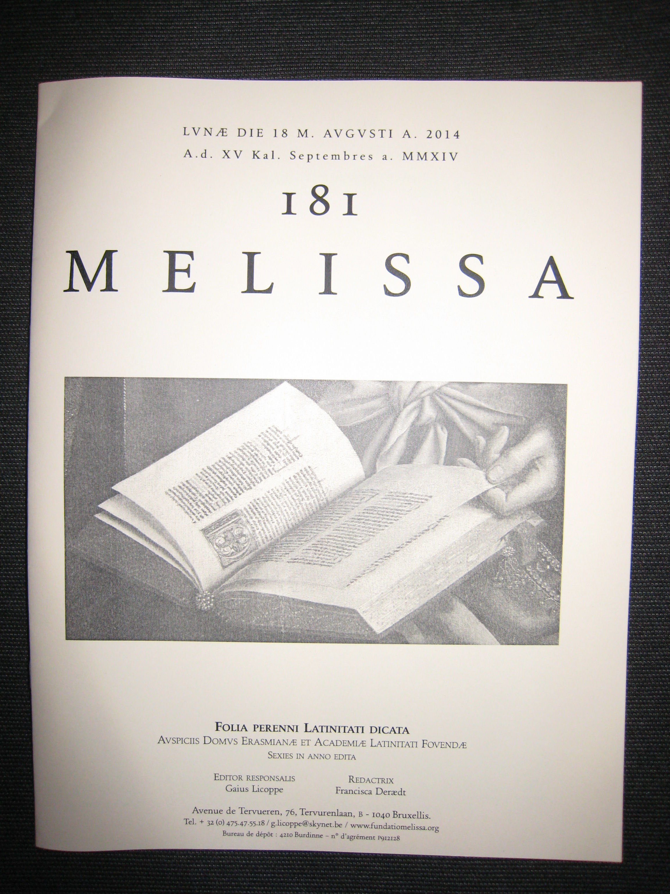 Lateinzeitschrift Melissa aus Brüssel, Nummer 181 vom August 2014